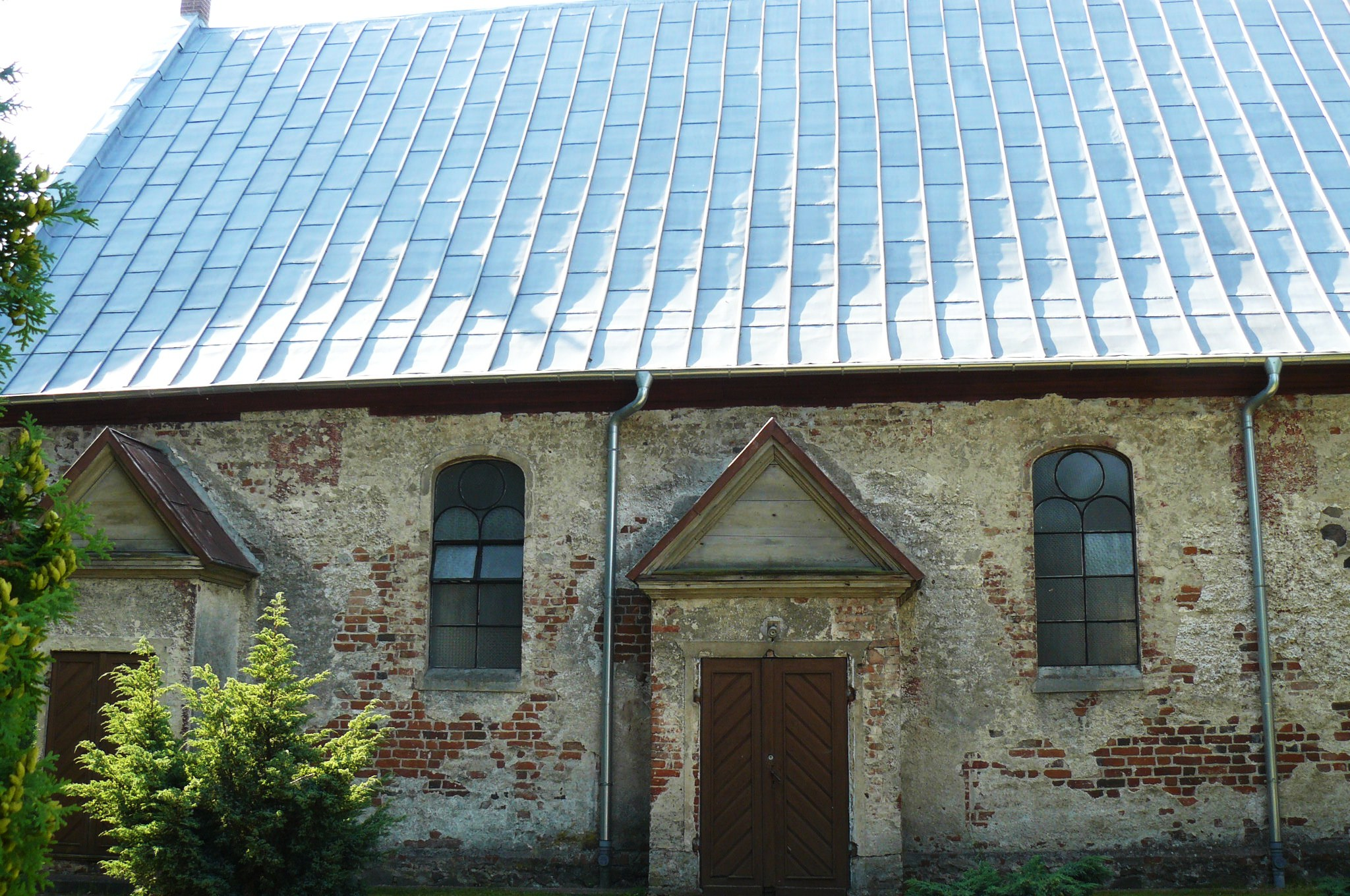 Kunowo nad Miedwiem. Kościół.